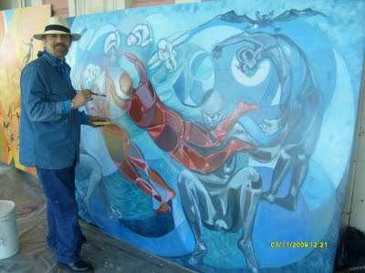 Julio Carrasco Breton pintando durante el encuentro Internacional La Plata, en adesion a la marcha mundial pour la paz y la no violencia y en homenaje al maestro muralista 'Italo Grassi' - Argentina, 2009